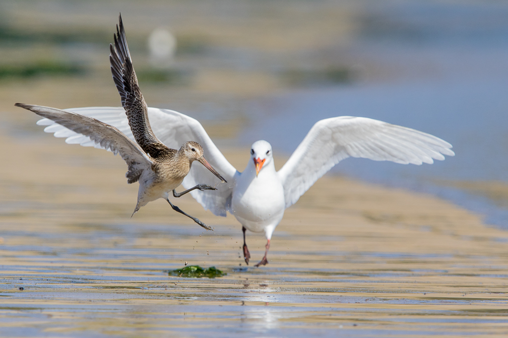 Una aguja colipinta (Limosa lapponica lapponica) emprende el vuelo ante el acoso de una gaviota cabecinegra (Ichthyaetus melanocephalus)